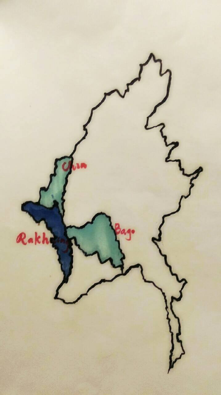 緬甸若開人分布圖